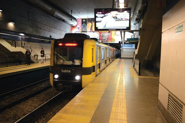 Tren arribando